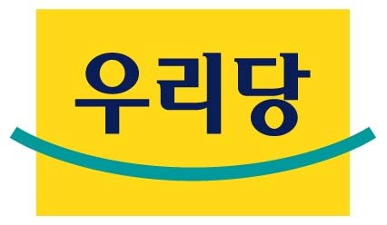 URI Partei